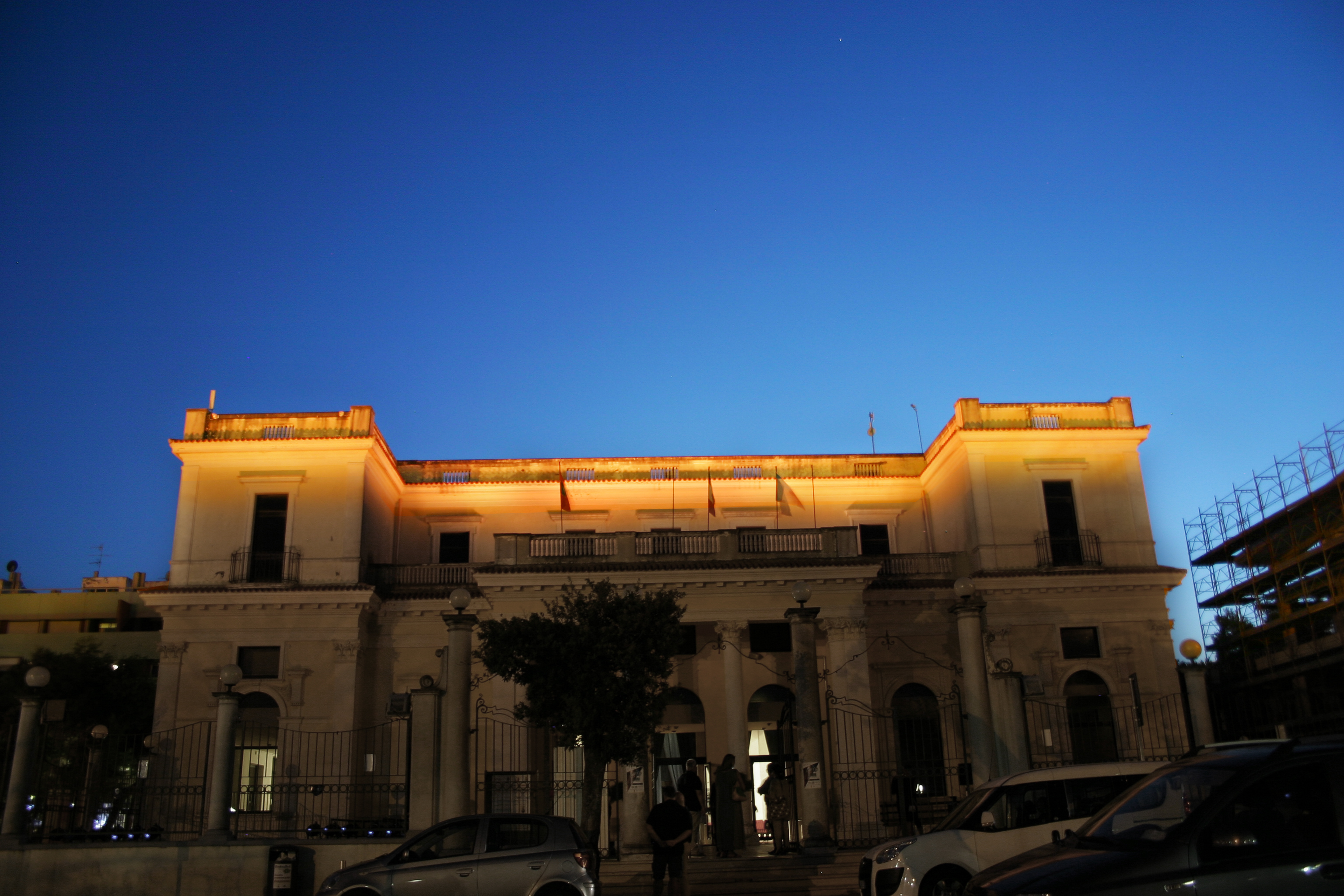 Installazione False Sunset sulla costa del Mare Adriatico. Kursaal di Giulianova